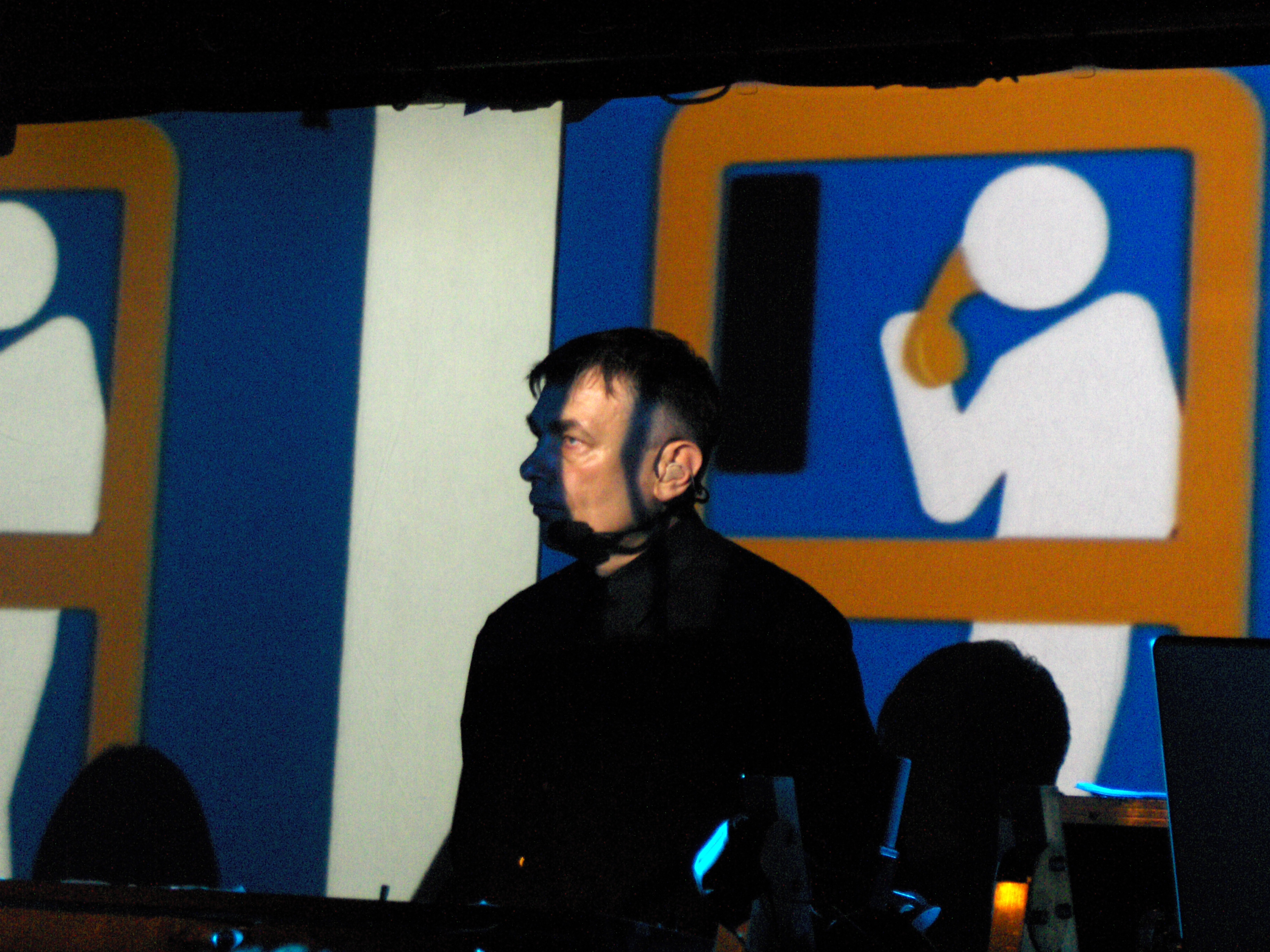 Karl Bartos live at Rust in Copenhagen, Denmark